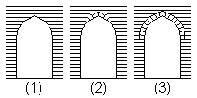 Entwicklung vom „falschen Bogen“ (Kragbogen) zum „echten Bogen“ in der indo-islamischen Architektur selbst gezeichnet nach: Andreas Volwahsen: Islamisches Indien. Benedikt Taschen Verlag, Köln 1994.